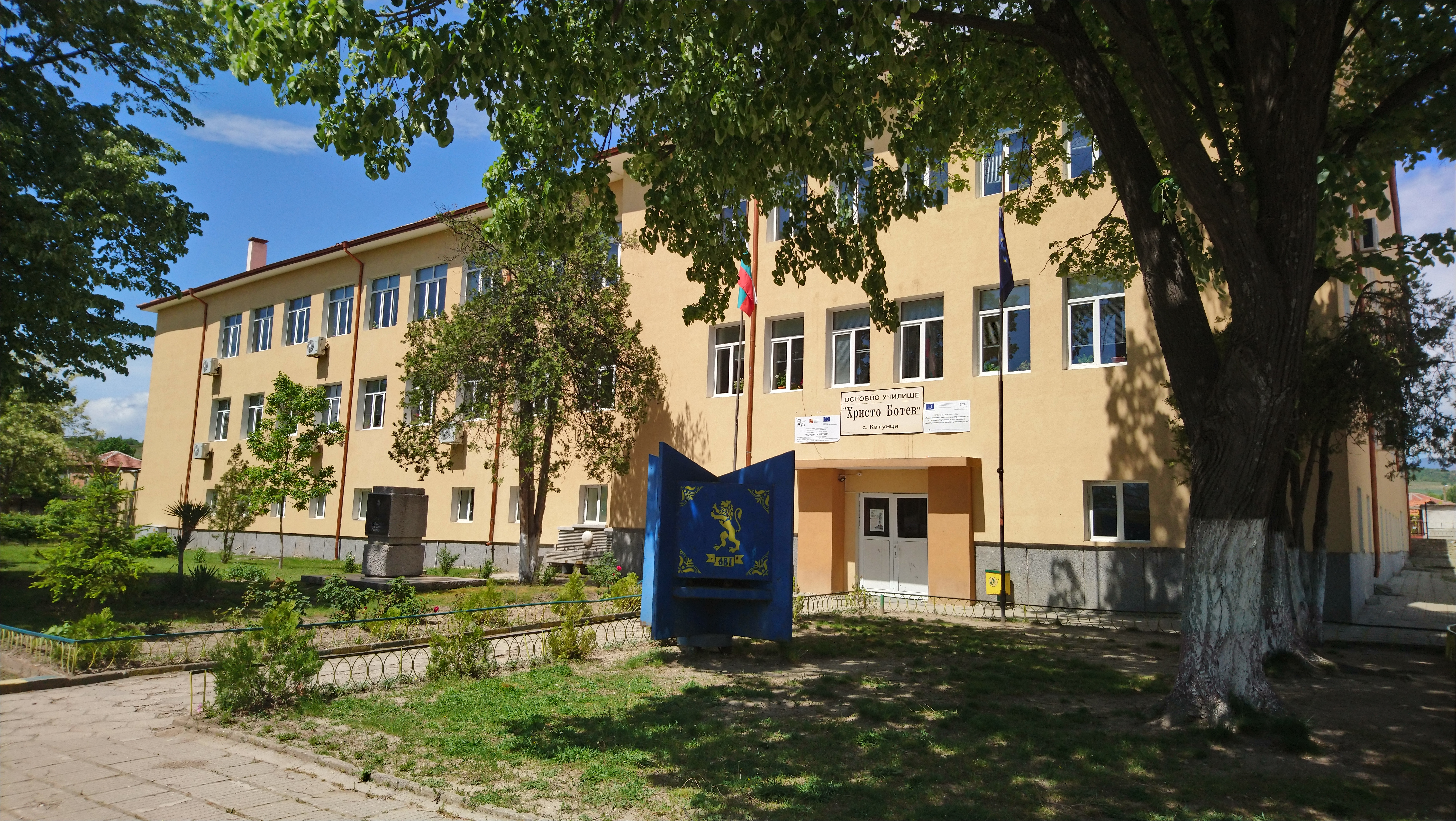 Основно училище Христо Ботев, село Катунци